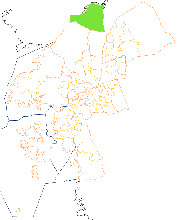 Karta som visar primärområdes belägenhet i Göteborg